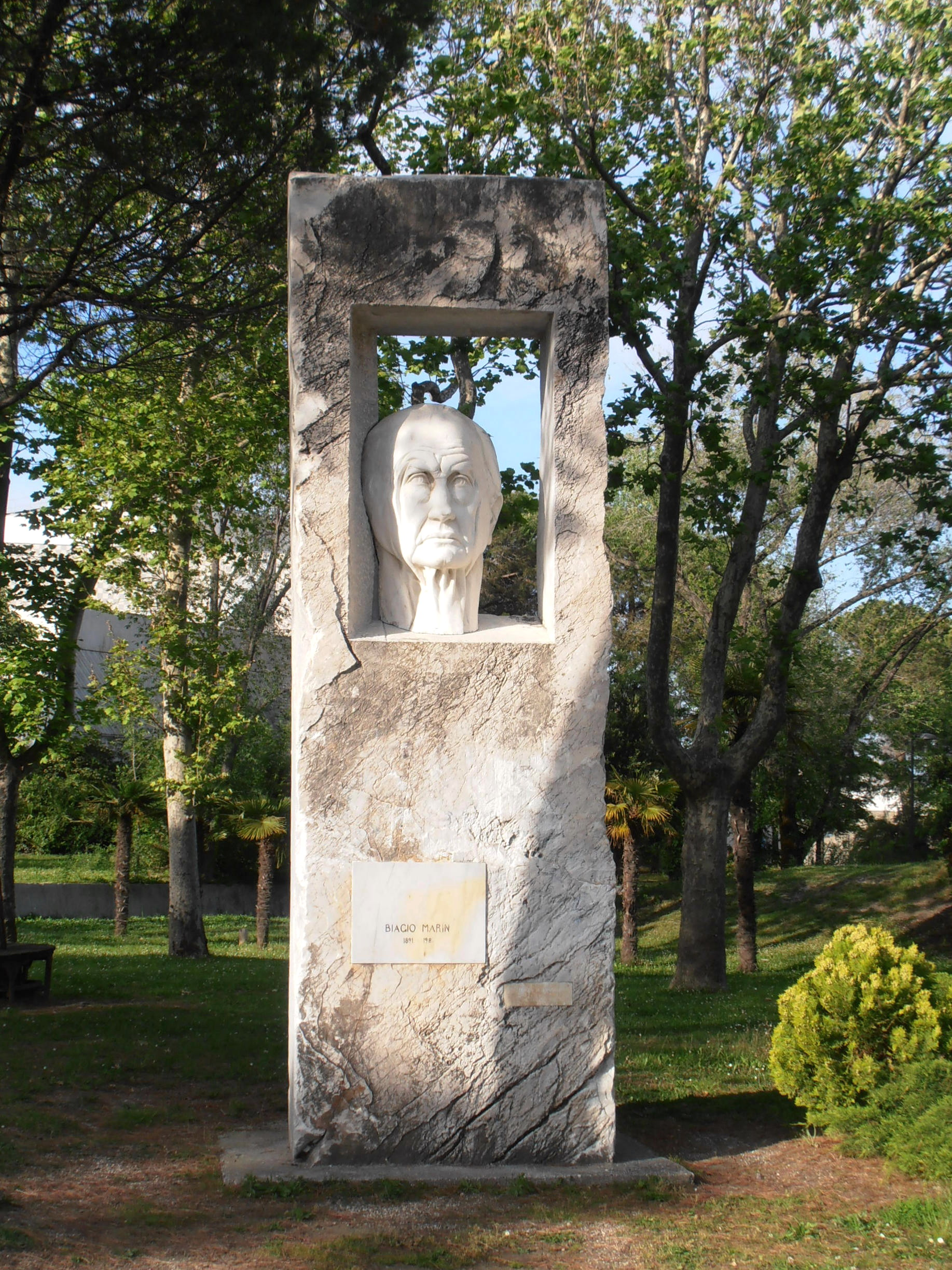 Italy - Grado - Parco delle rose - Monumento a Biagio Marin